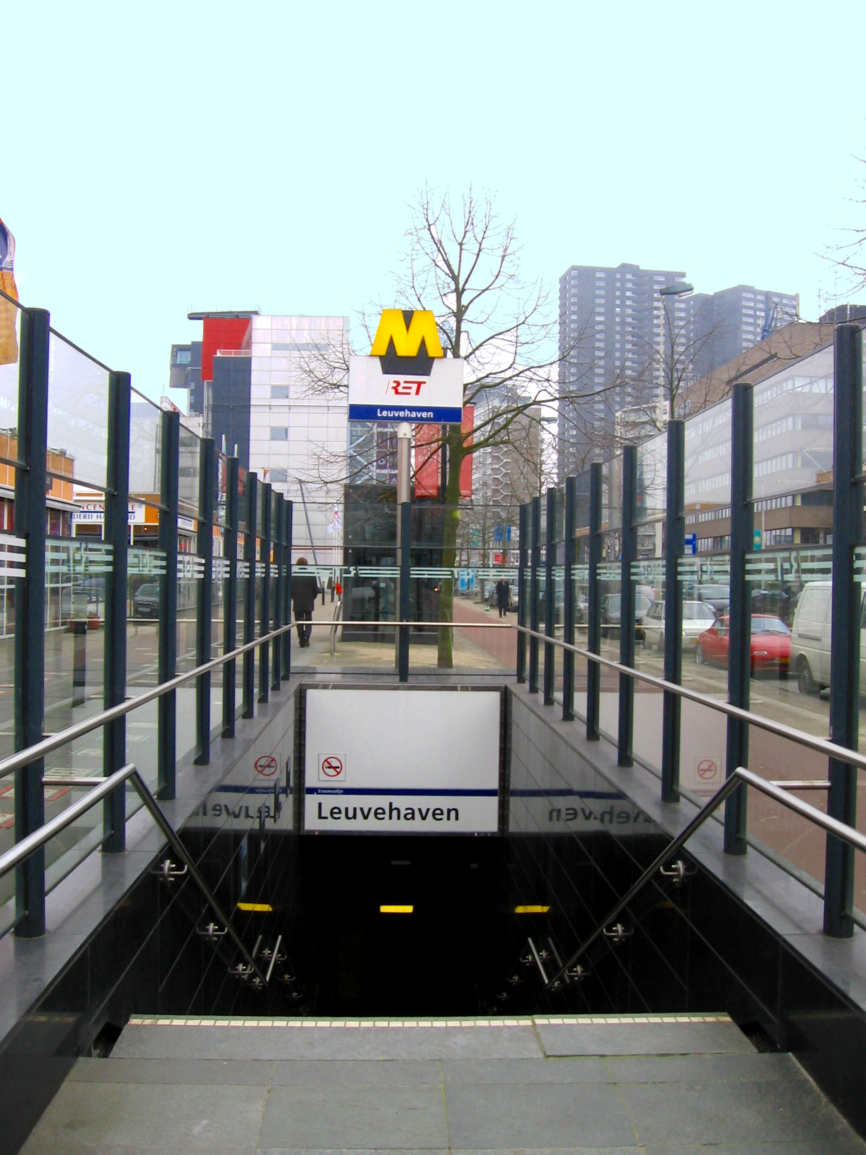 Één van de ingangen van metrostation Leuvehaven, Rotterdam